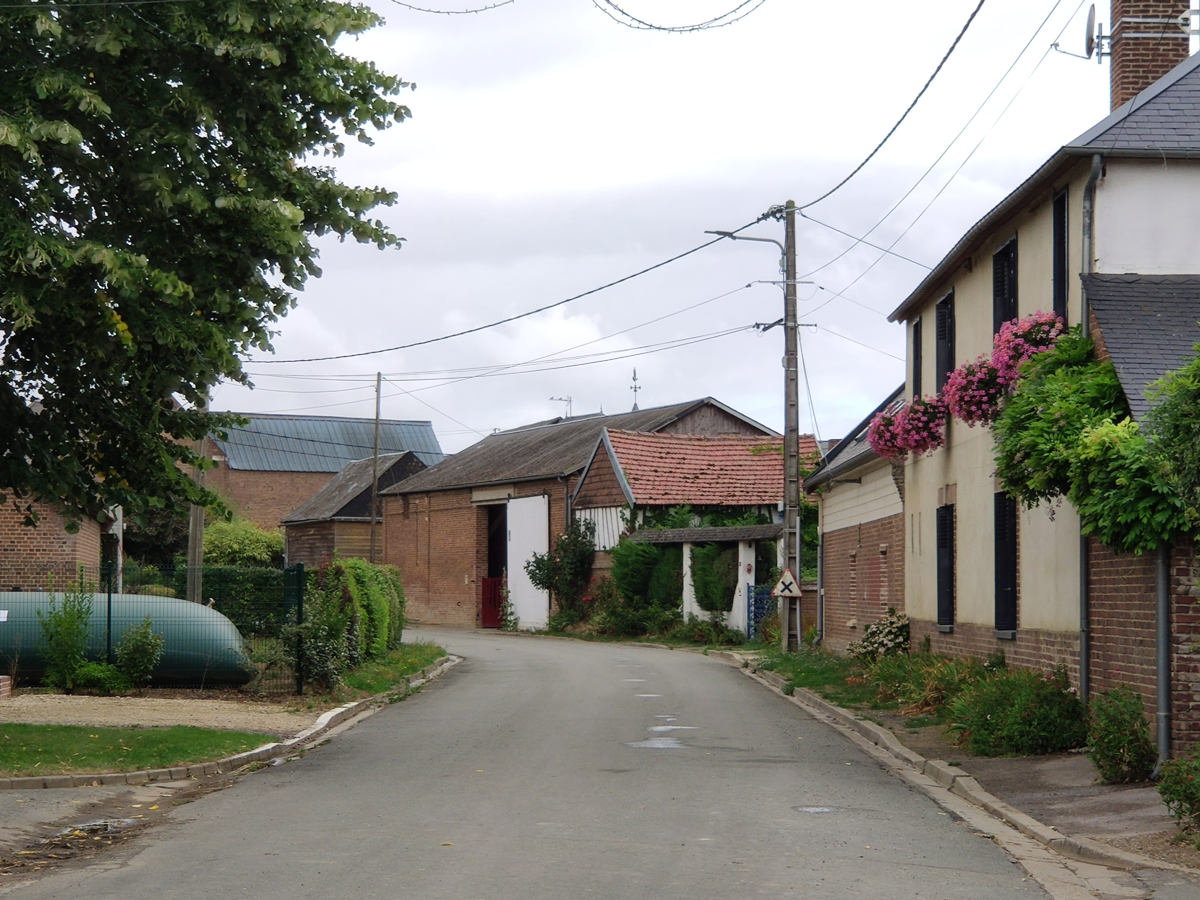 Le Saulchoy (60) : Rue des Frères Boutillier